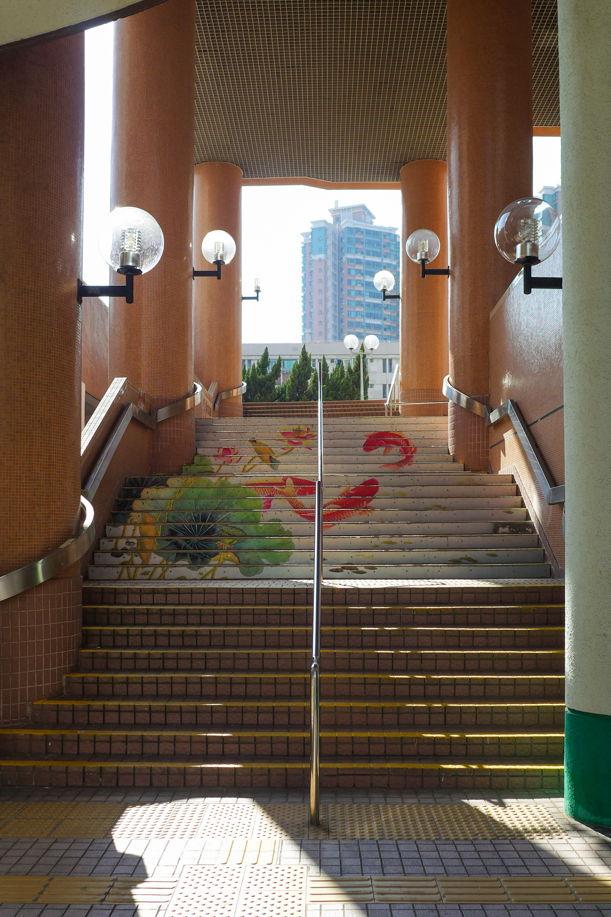 Shui Pin Wai Estate Dip Shui House stairs